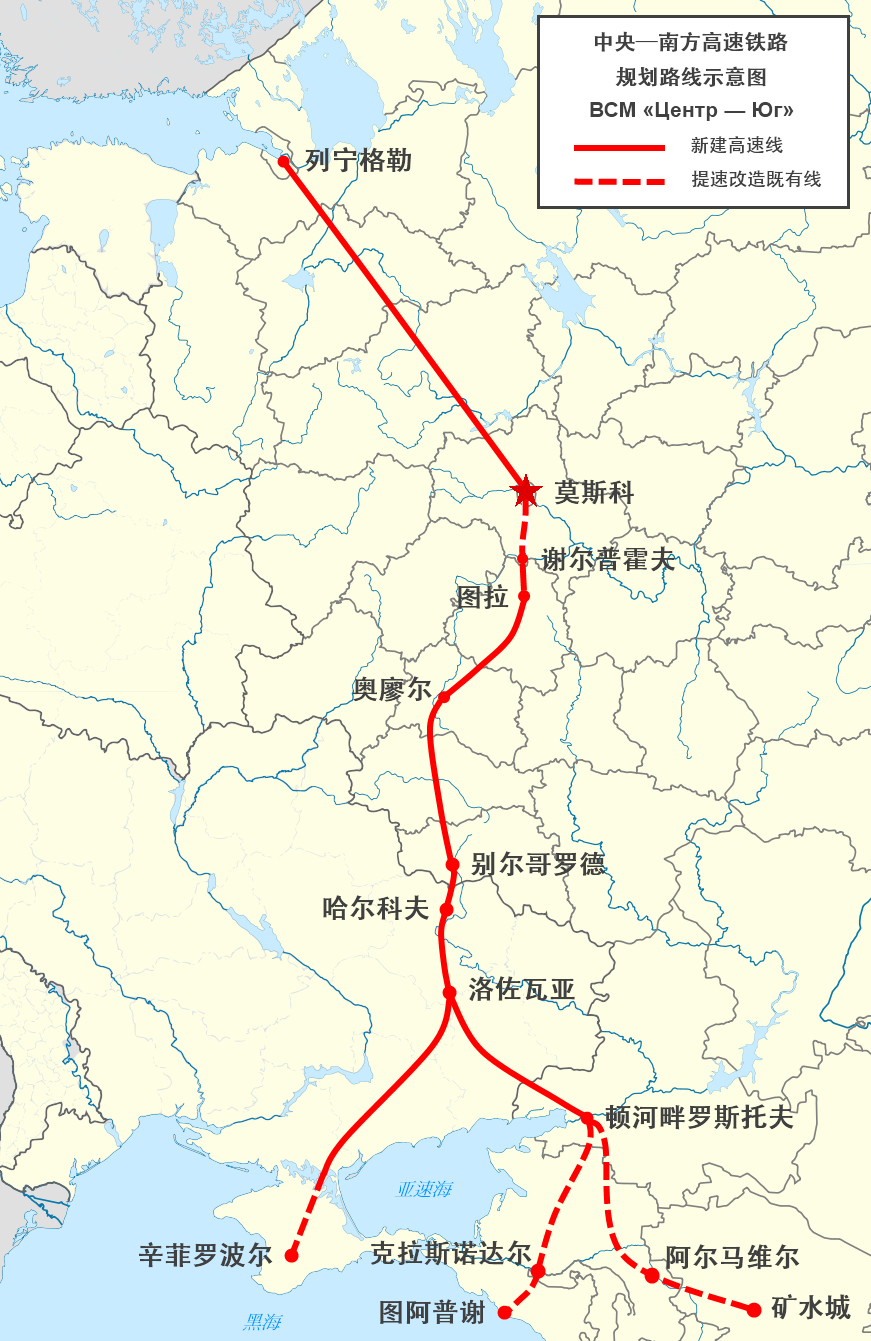 中央-南方高速铁路规划路线示意图